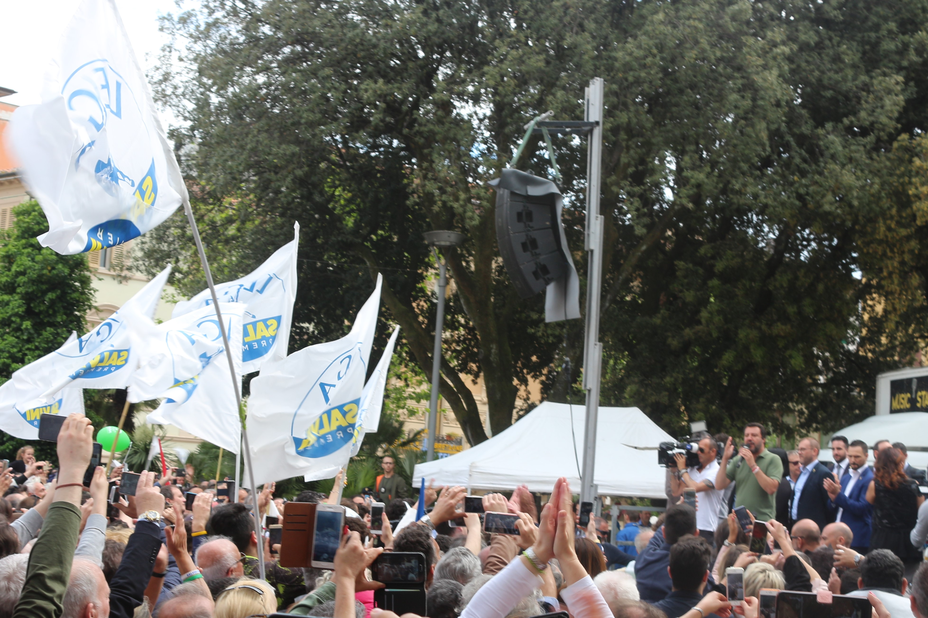 Comitato elettorale della Lega davanti alla Basilica di Montecatini Terme per le elezioni comunale ed europee di maggio 2019, con Matteo Salvini, Susanna Ceccardi (candidata nella circoscrizione Italia Centrale) e il candidato sindaco locale Luca Baroncini